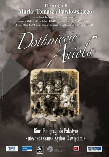 Plakat filmu "Dotknięcie anioła"